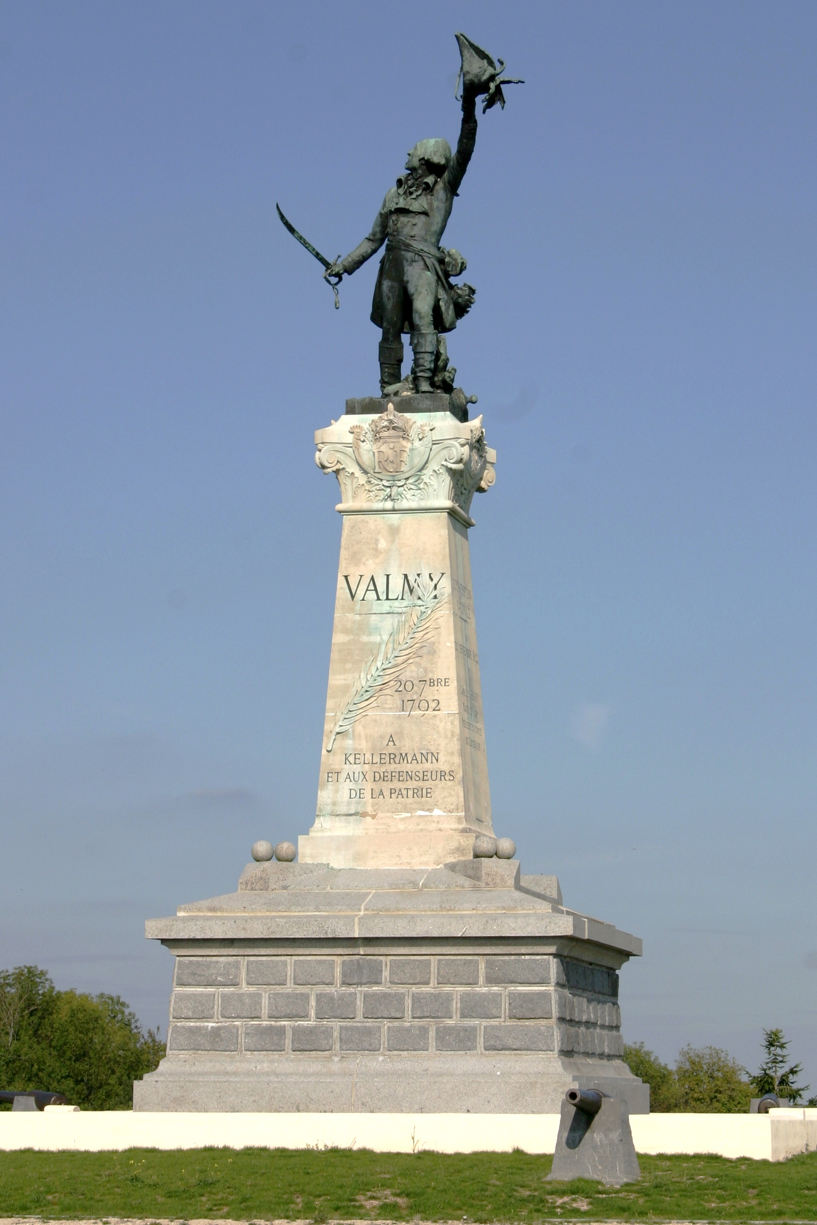 D'Monument vum Generol Kellermann bei der Mille vu Valmy.